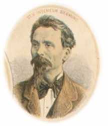 Sigmund Adolf